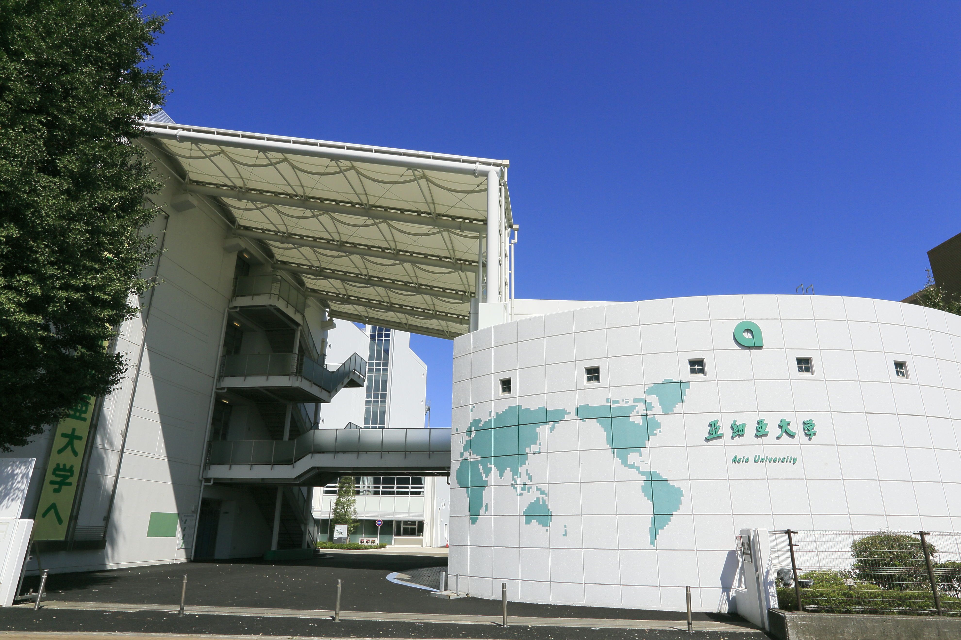 亜細亜大学南門